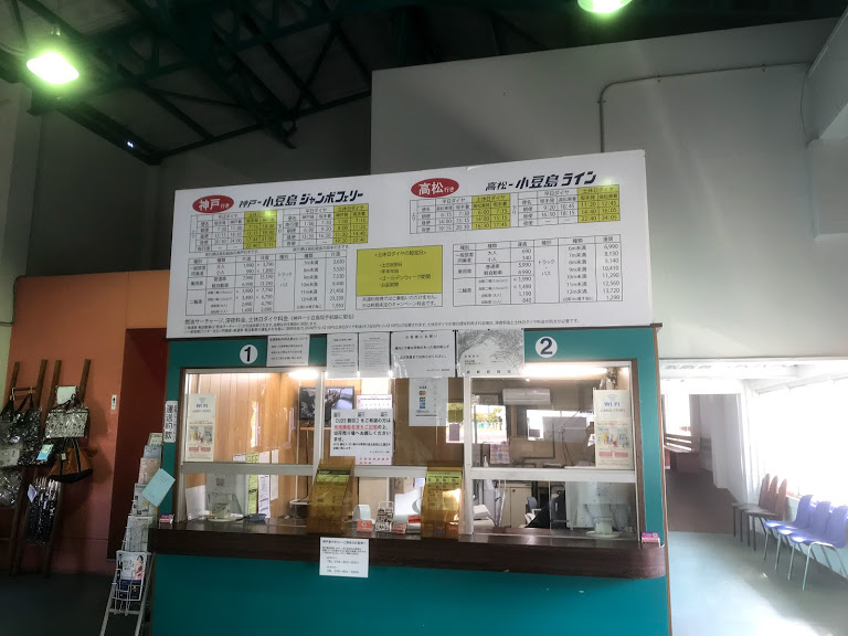 2019年4月12日撮影